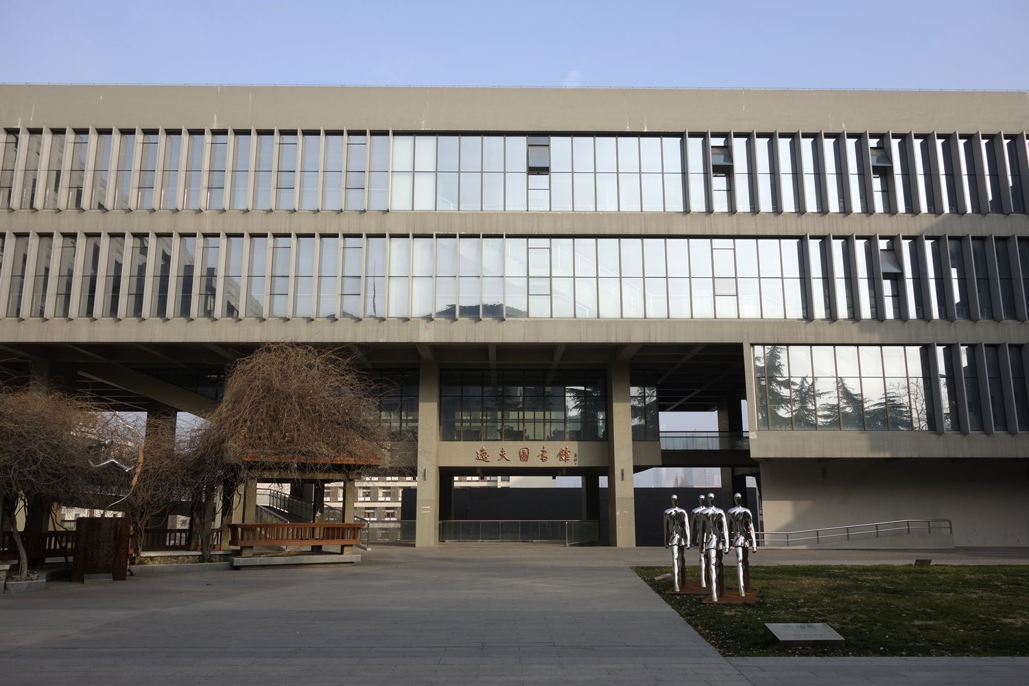 中文（中国大陆）: 南京艺术学院本部 逸夫图书馆